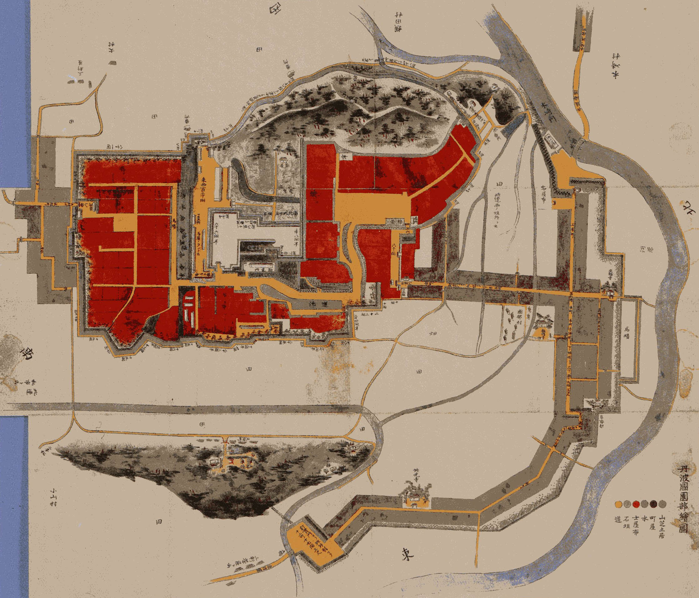 丹波国園部絵図